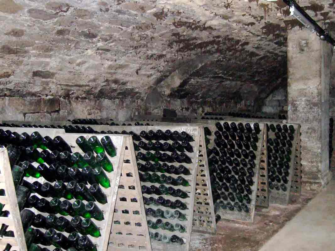 Kessler-Sektkellerei, Esslingen am Neckar, Rüttelpulte